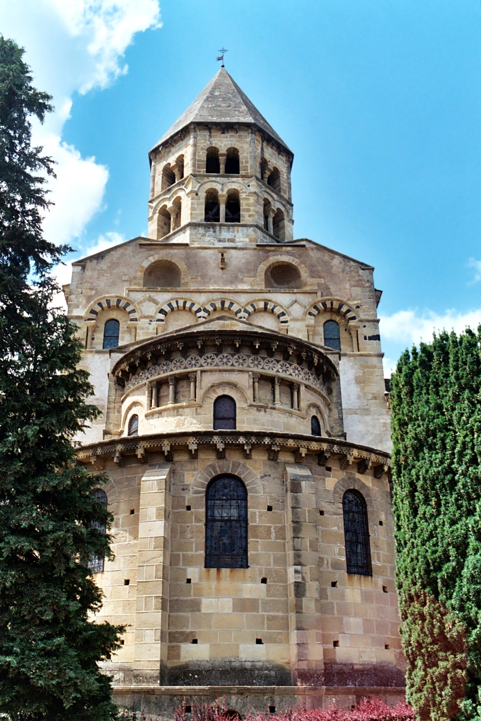 France - Auvergne - Puy-de-Dôme - Église Notre-Dame de Saint-Saturnin - Chevet